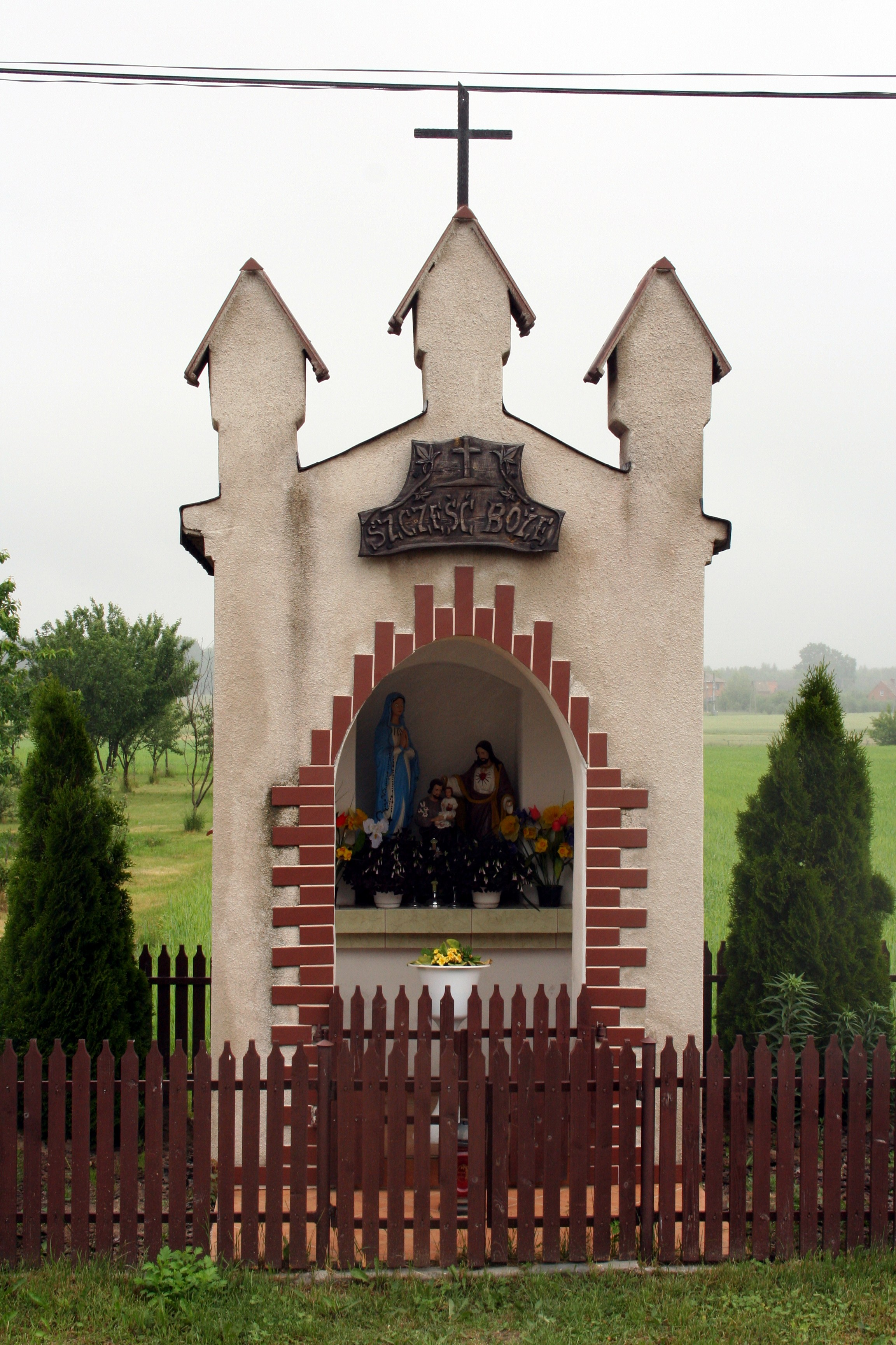 kapliczka w miejscowości Lubockie, powiat lubliniecki